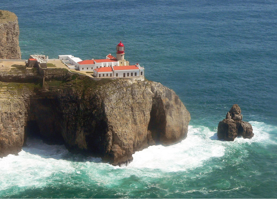 Leuchtturm und Klippen mit Brandung in Sagres